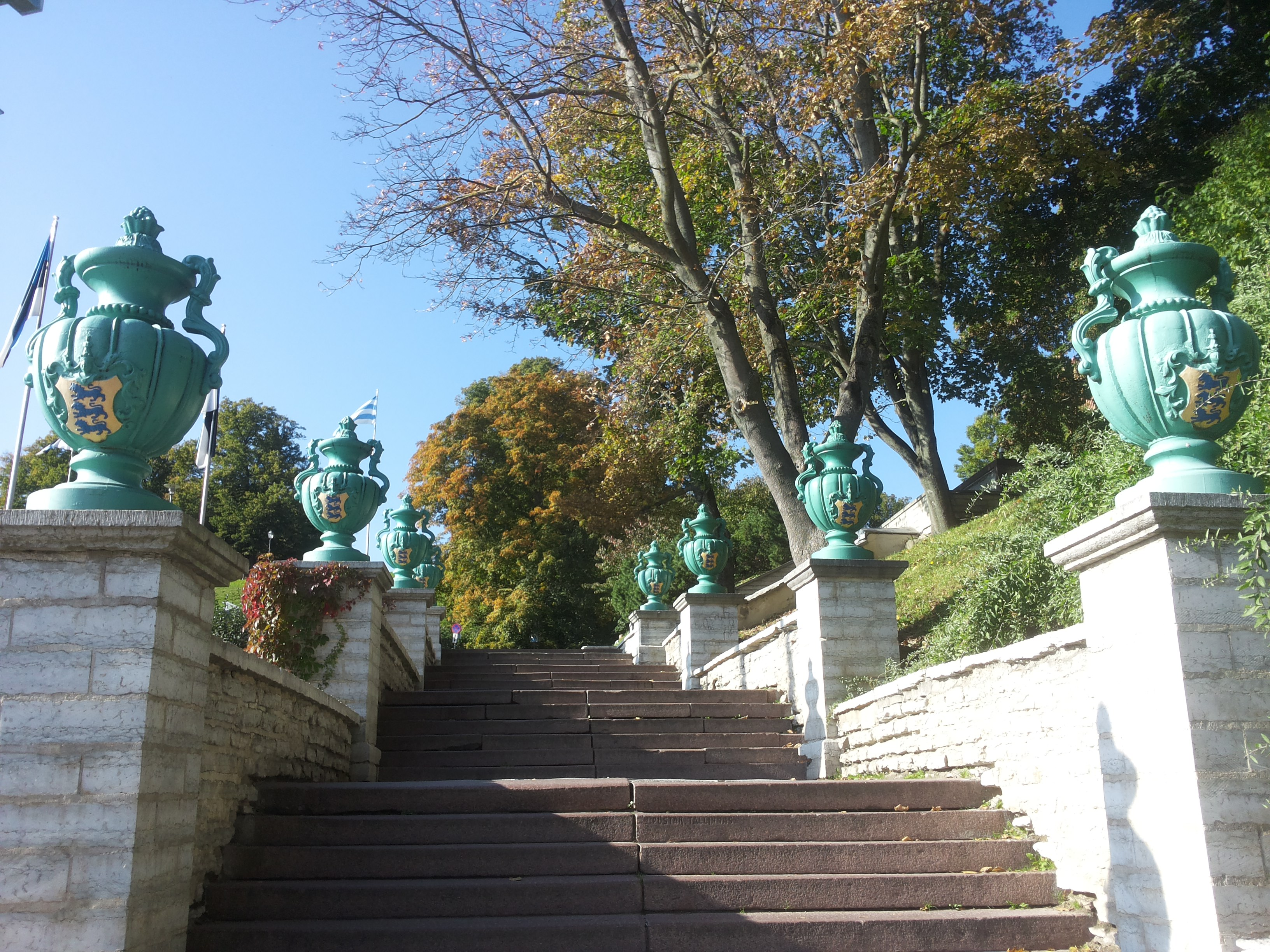 Trepistiku kaheksa dekoratiivvaasi, 1885- 1887 (malm)